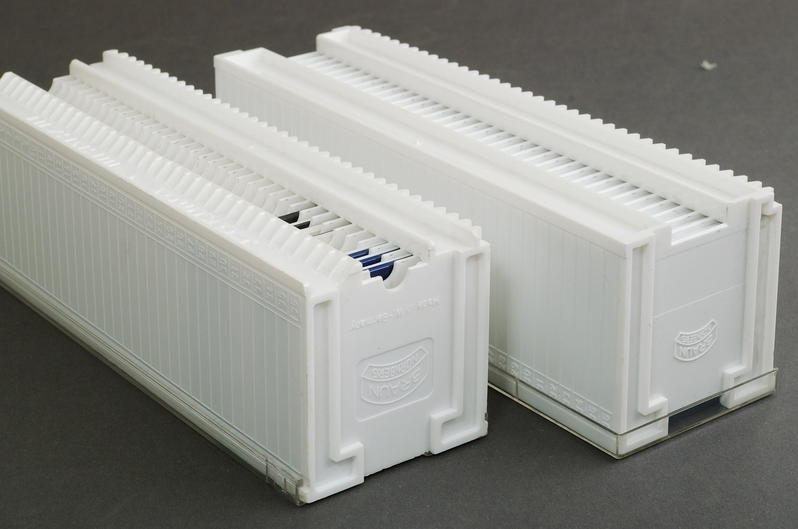 Braun Paximat, zwei Diamagazine unterschiedlicher Generationen